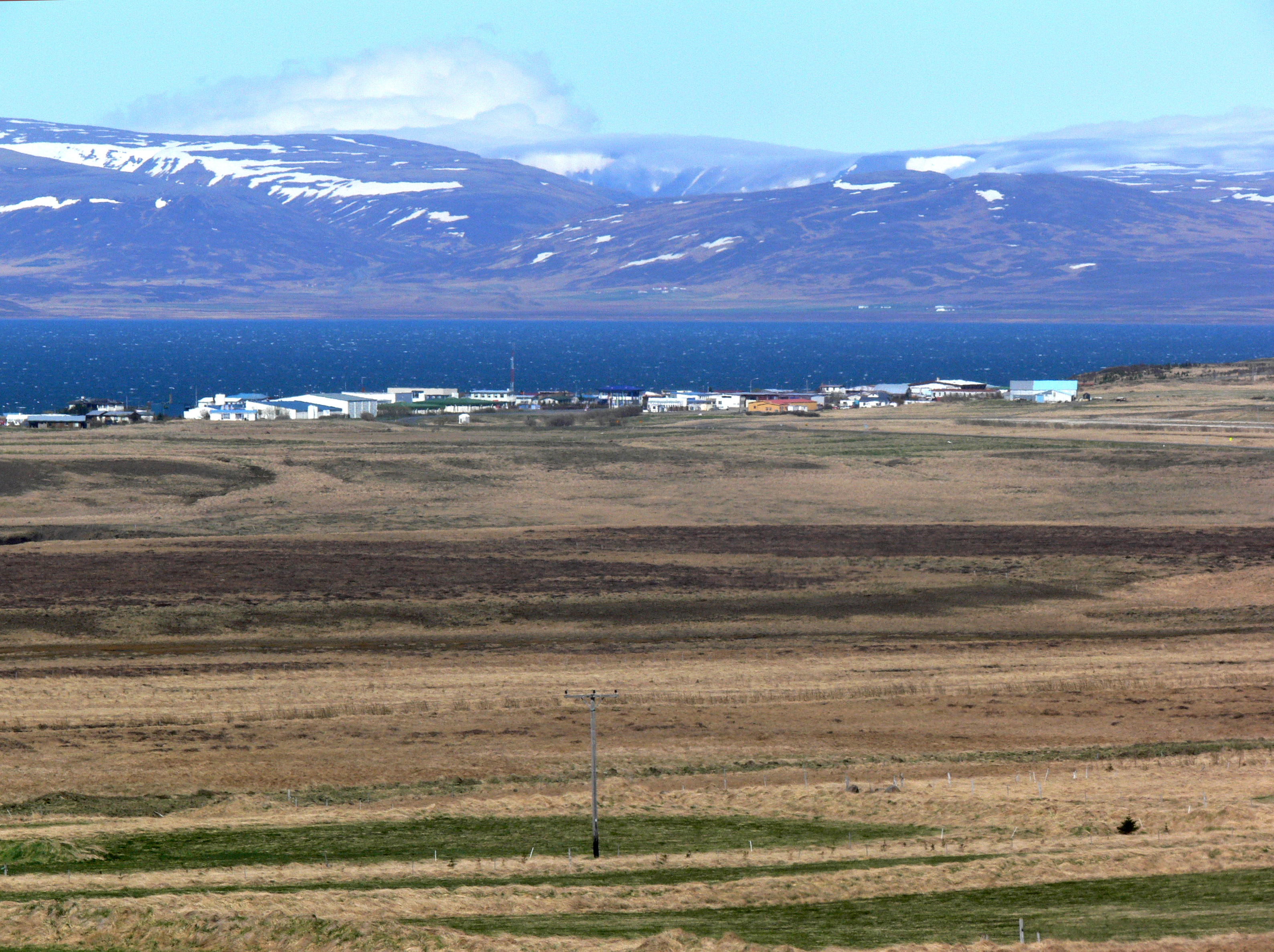 Búðardalur am Hvammsfjörður. Nach der Laxdæla saga siedelte hier Höskuldur nach seiner Rückkehr aus Norwegen und Ólafr pái (Olaf Pfau) wurde hier von seiner Nebenfrau Melkorka geboren.